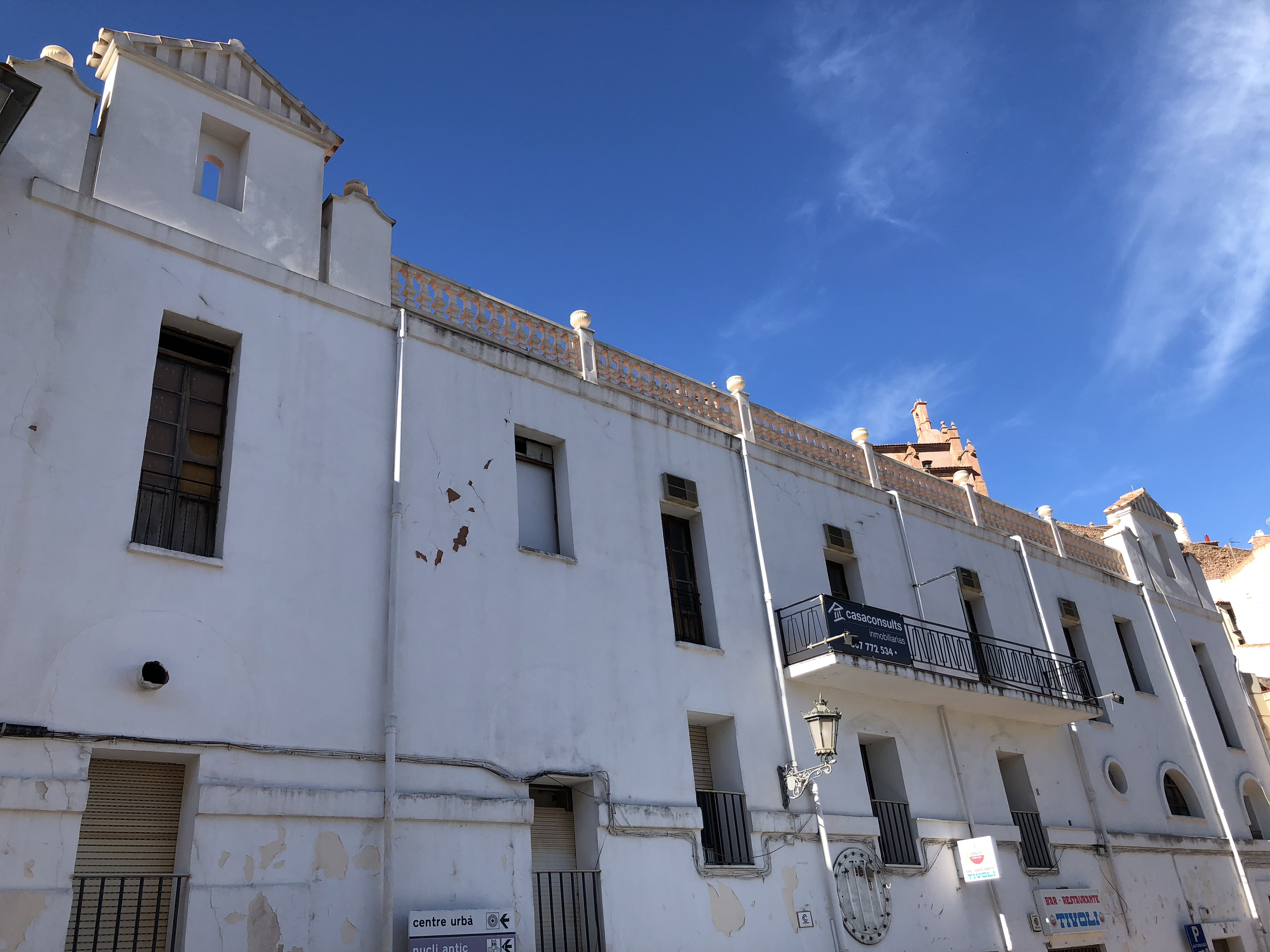 Restaurante Tívoli, que en 1938 era el Centro Radical Republicano, albergaba a un total de 80 soldados.